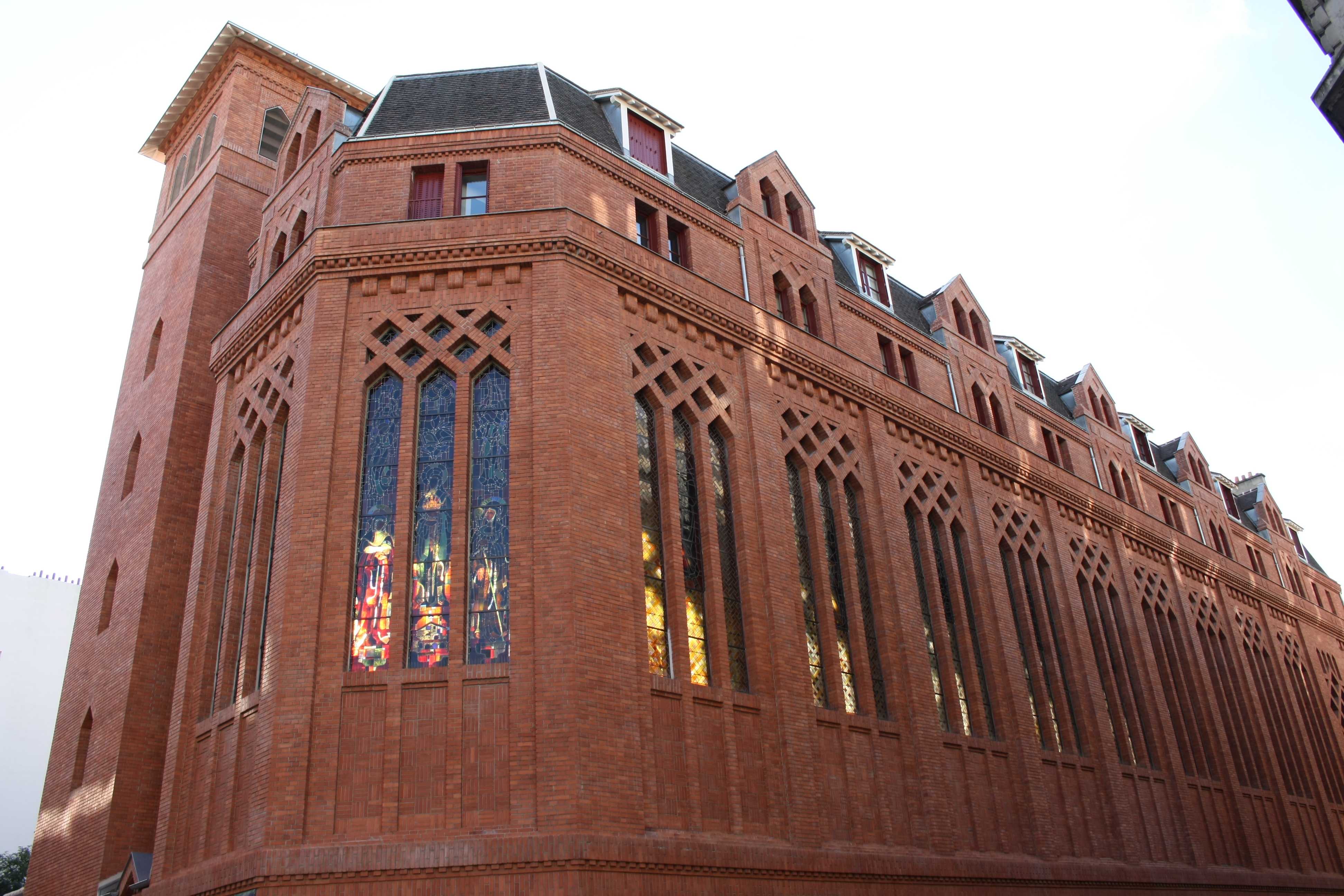 Kapelle des Couvent Saint-François in Paris (7 rue Marie-Rose im 14. arrondissement), Außenansicht